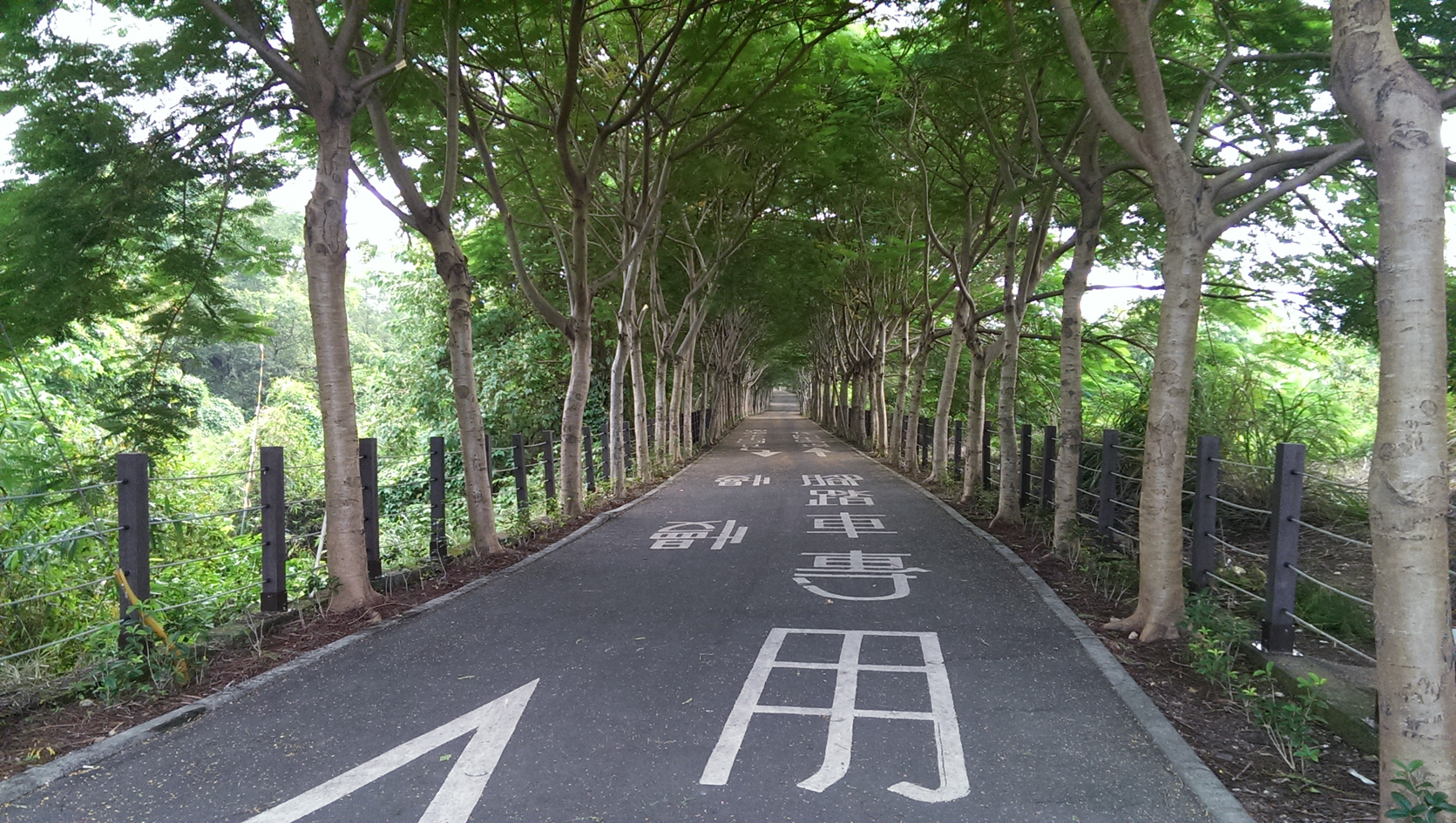 中文（台灣）: 后豐鐵馬道 起點處